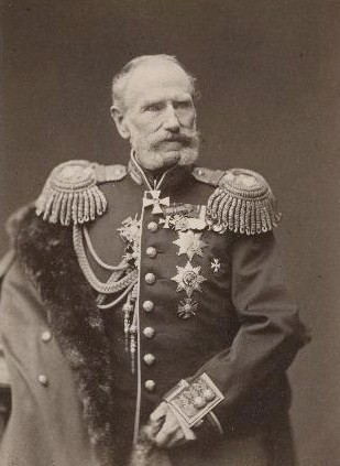 Павел Евстафьевич Коцебу (1801—1884)